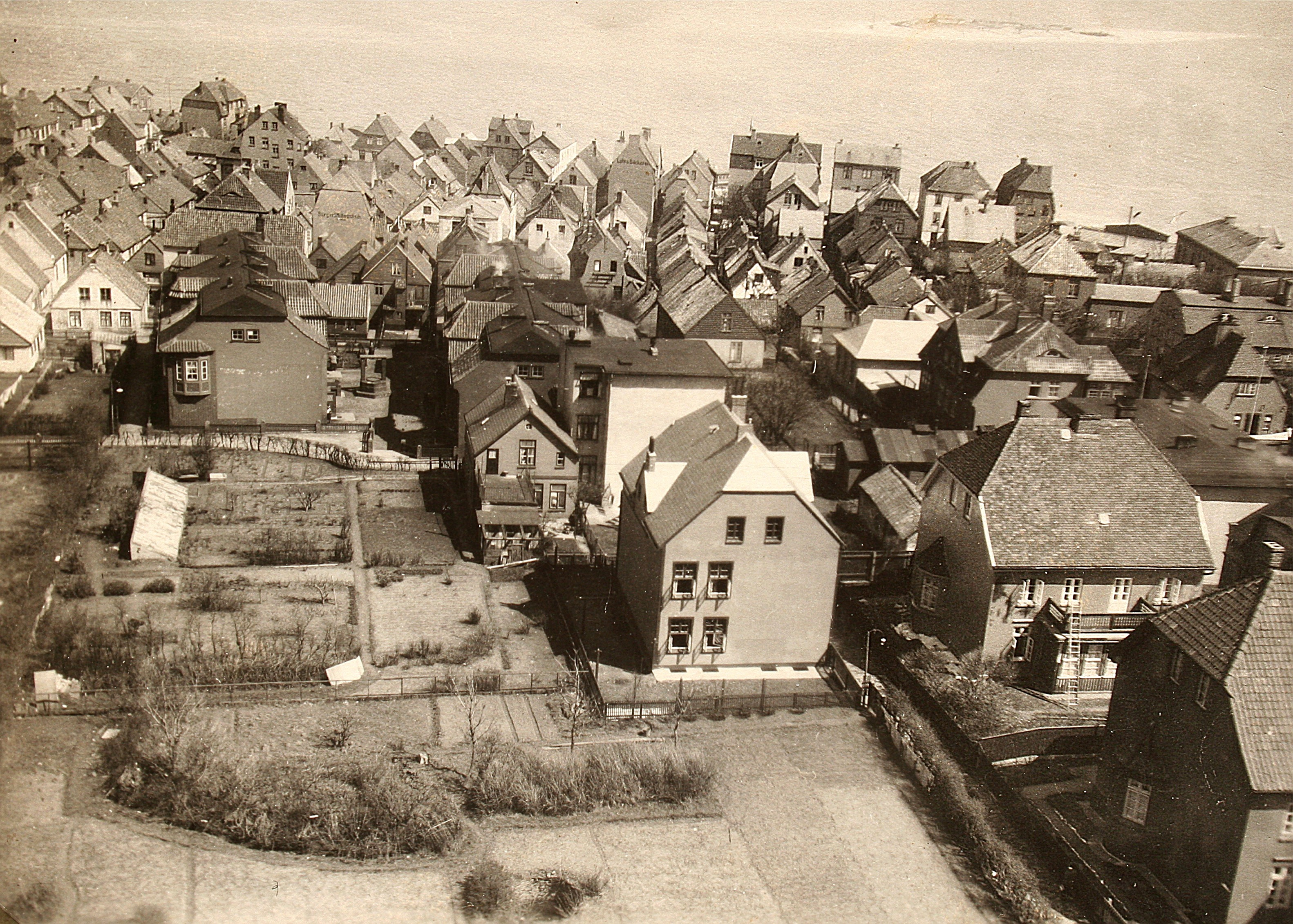 Insel Helgoland - Oberland, vom Leuchtturm aus fotografiert